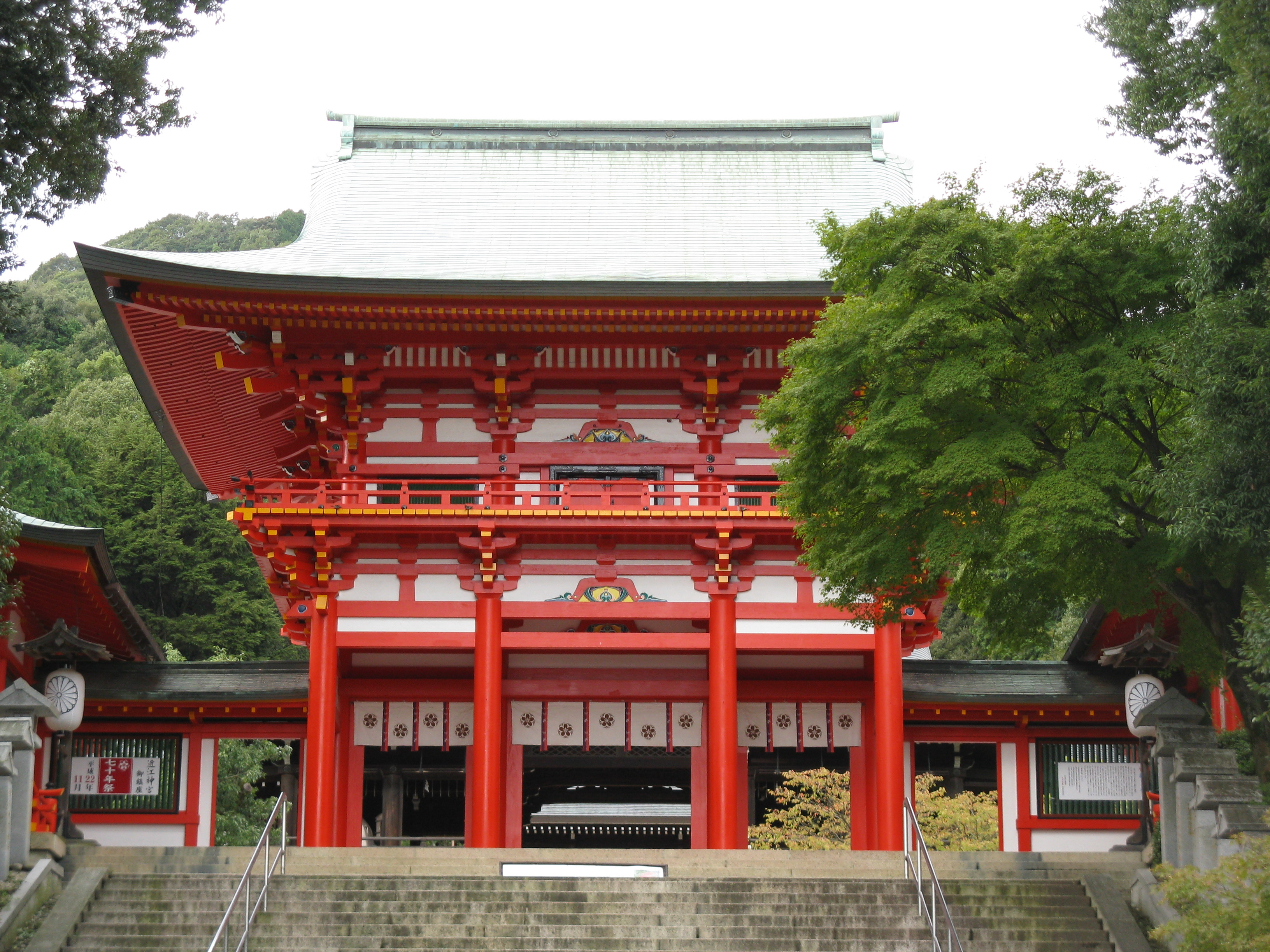 近江神宮 楼門